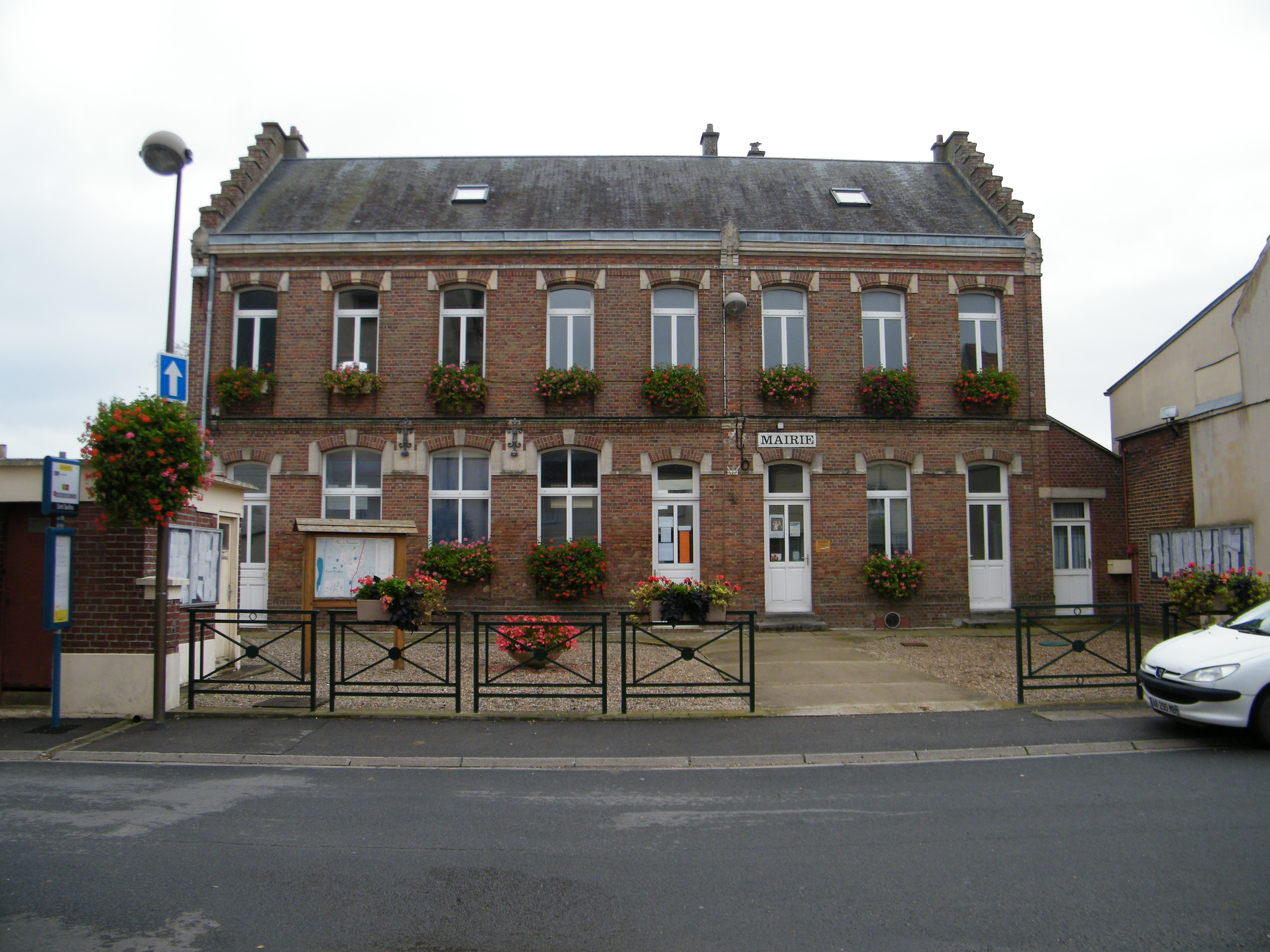 Mairie.